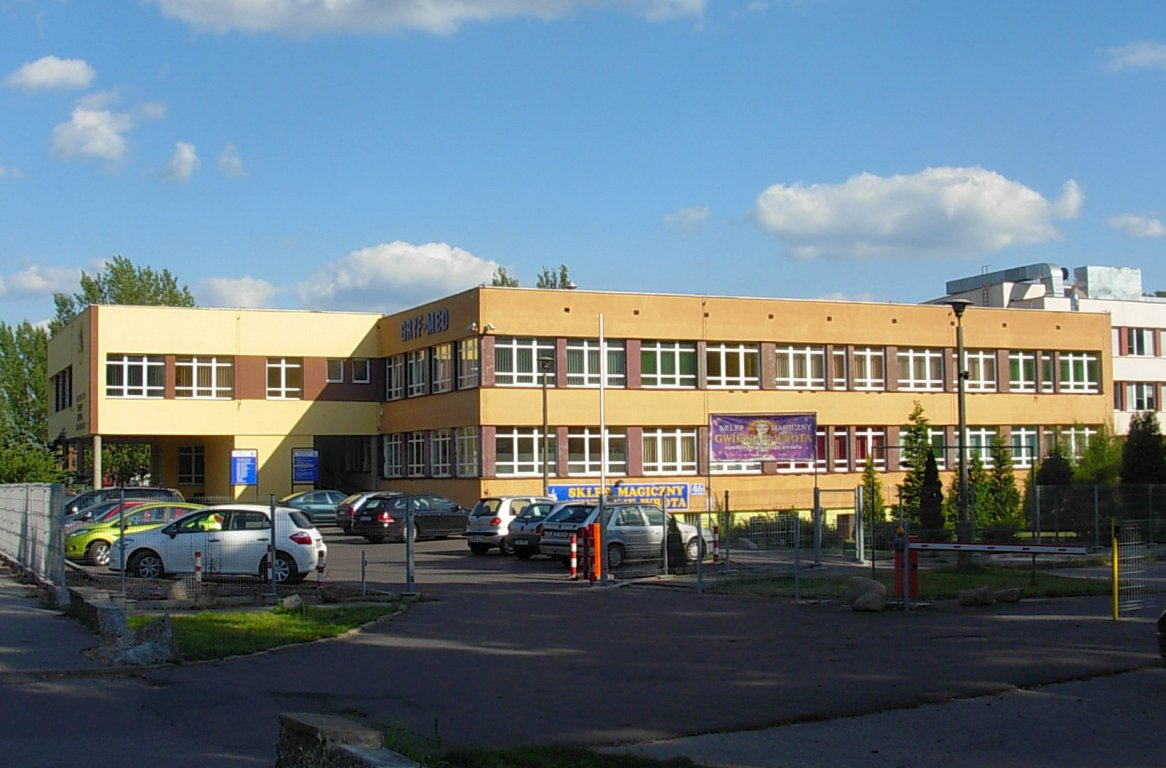 Wyższa Szkoła Humanistyczno-Ekonomiczna w Łodzi Wydział Zamiejscowy w Bydgoszczy ul. Wojska Polskiego